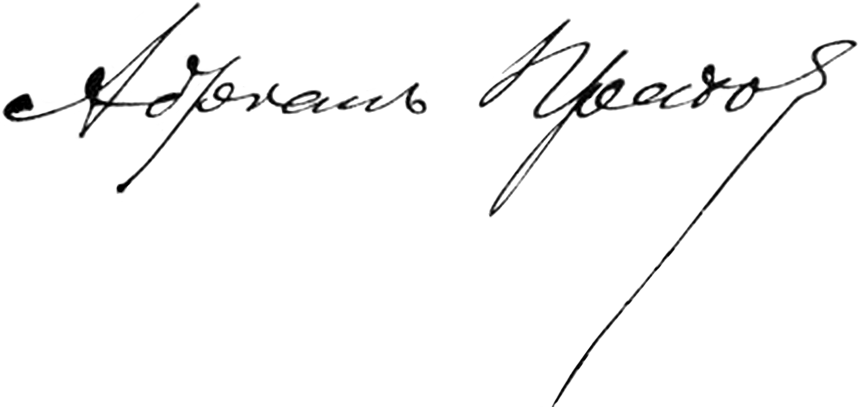 Роспись профессора Адриана Прахова (1846–1916)